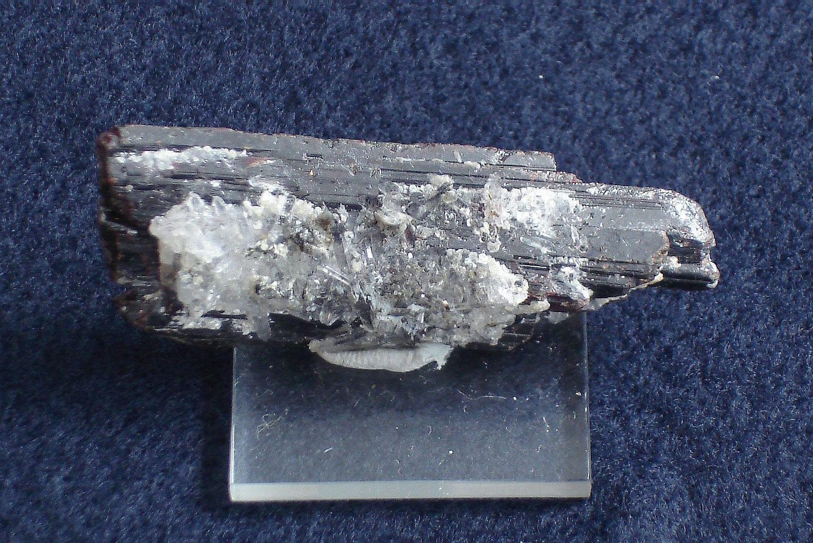 An hubnerite (MnWO4 crystal, 4 cm long. Origin:Cerro de Pasco, Peru